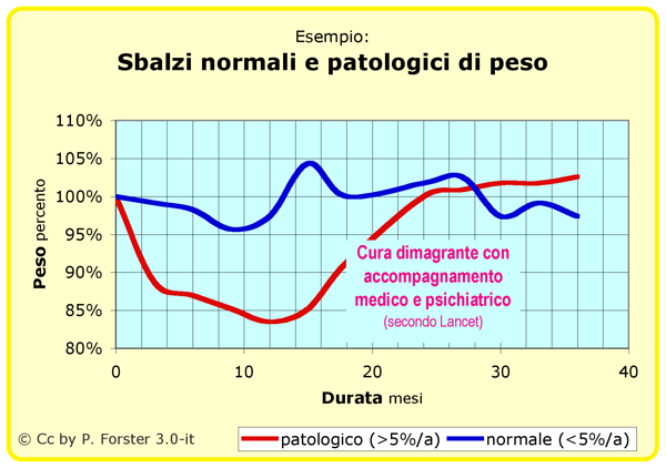 Sbalzi di peso "normali" e patologici in funzione del tempo (esempio)